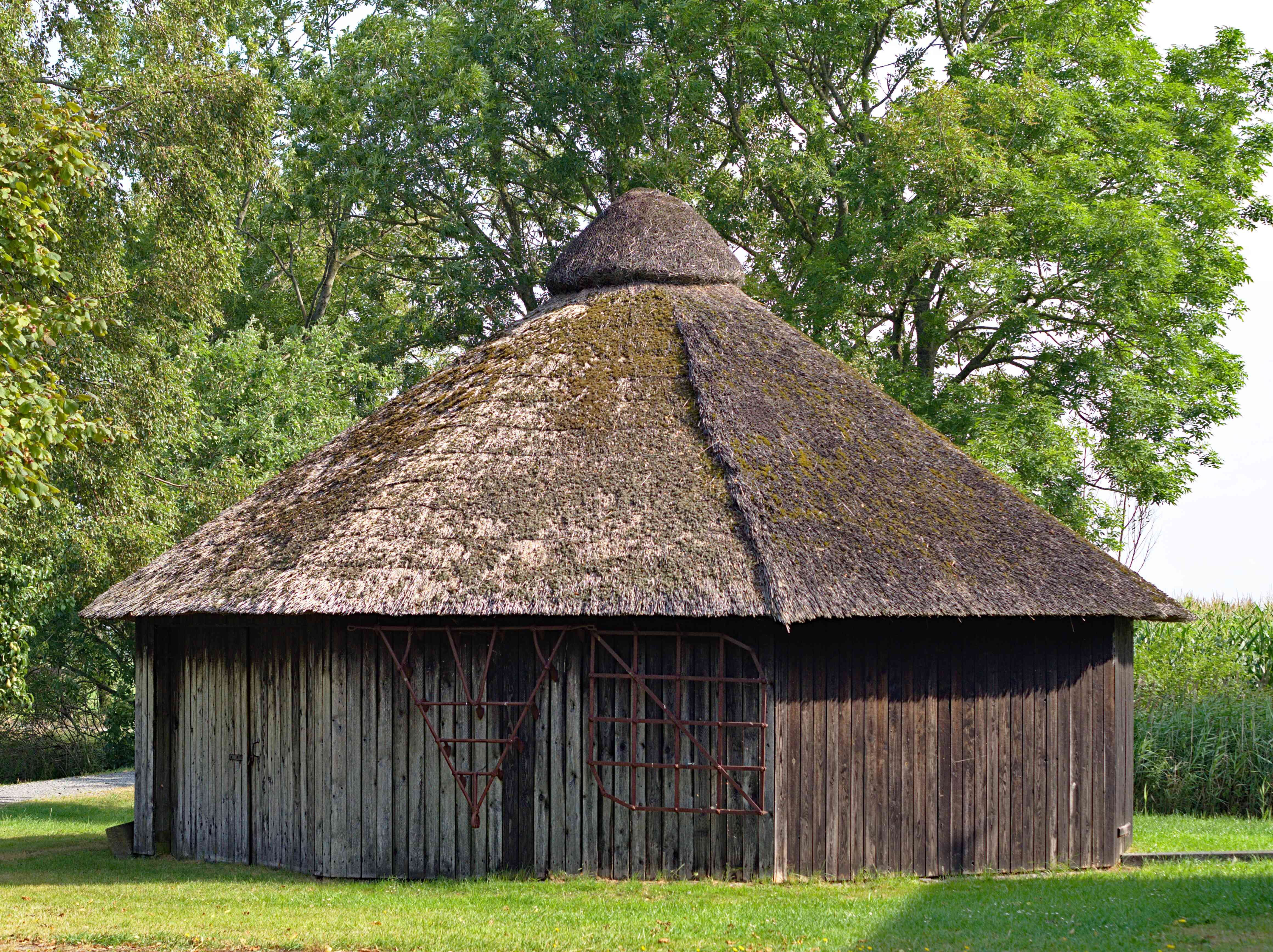 Das Göpelhaus am Museum Moorseer Mühle in Nordenham-Abbehausen.